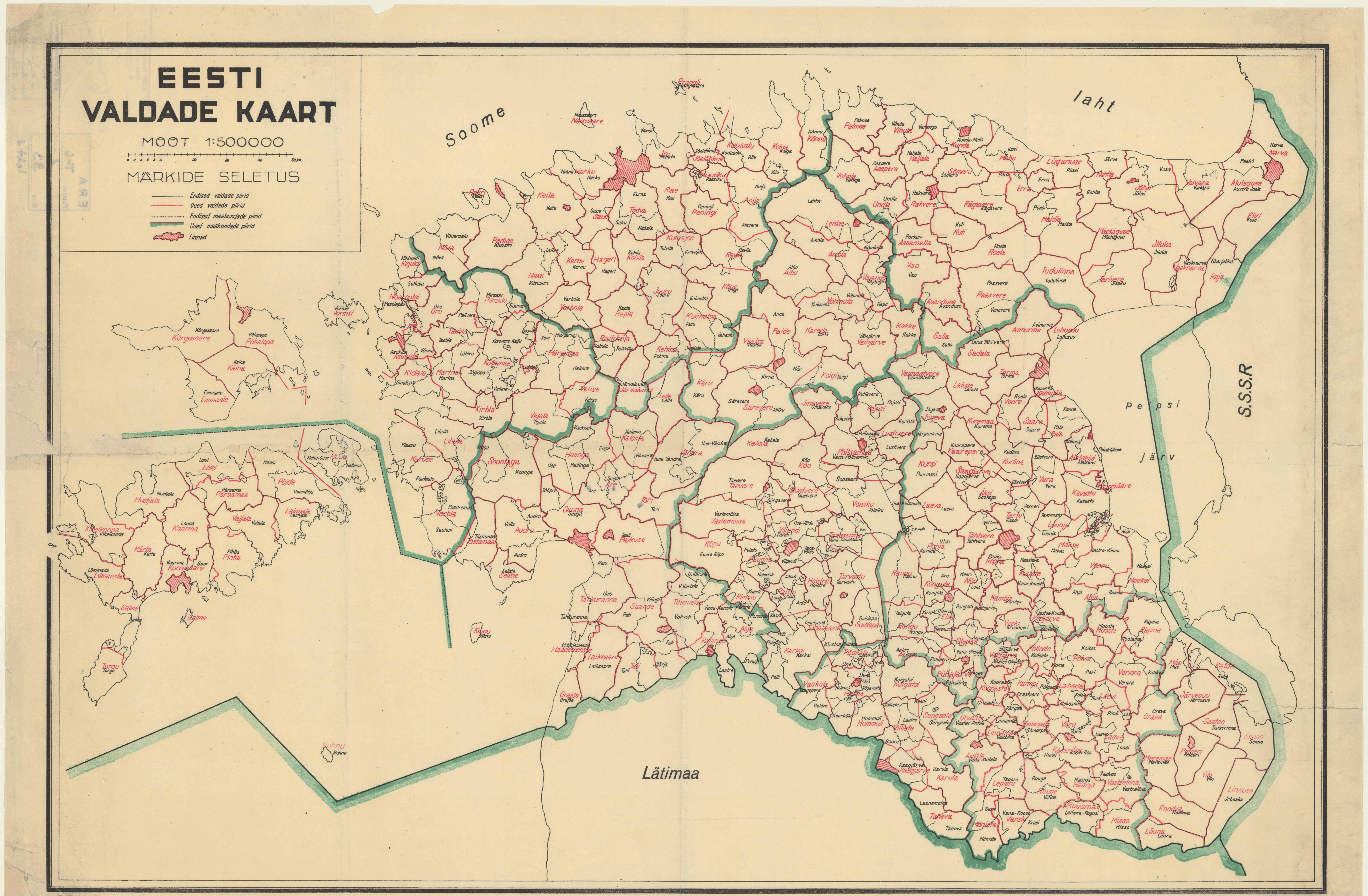 Eesti valdade kaart, 1939. a. reform. Musta kontuuriga vanad vallapiirid, punasega 1939. aastal moodustatud vallad.